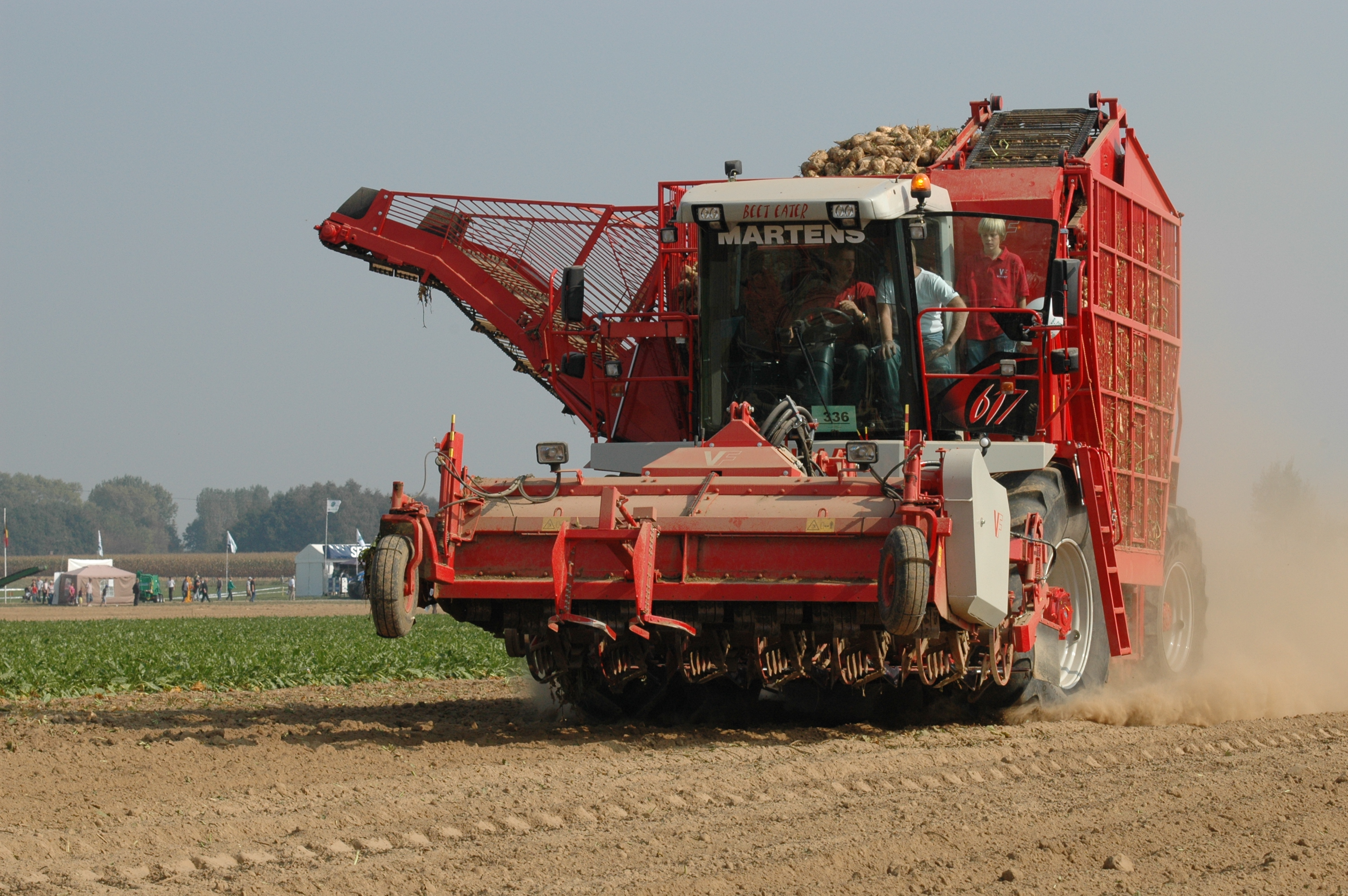 Ein Rübenvollernter Vervaet Beet Eater 617, Werktuigendagen 2009.